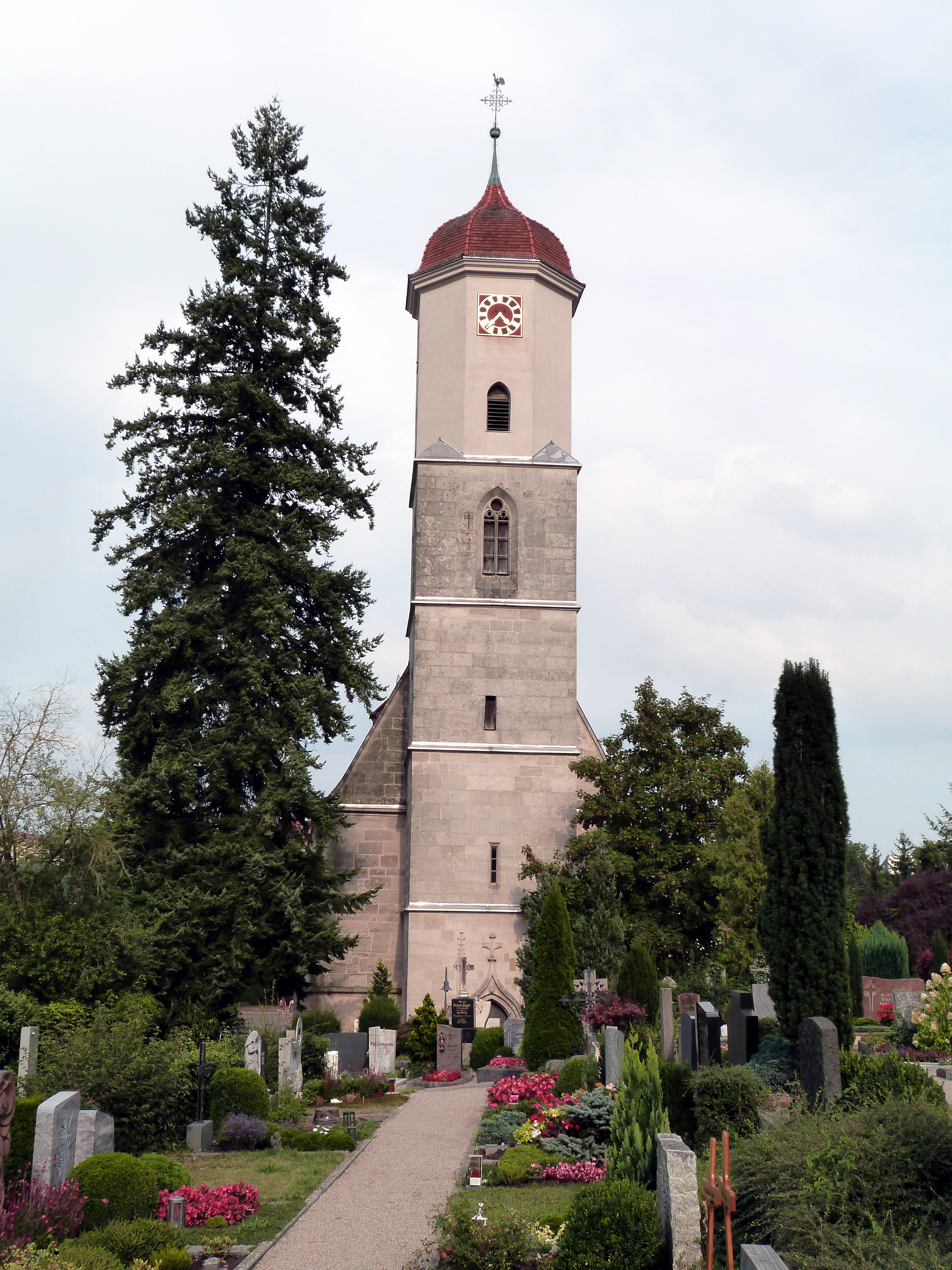 St. Wolfgang (Ellwangen), Kirchturm vom Friedhof her aufgenommen